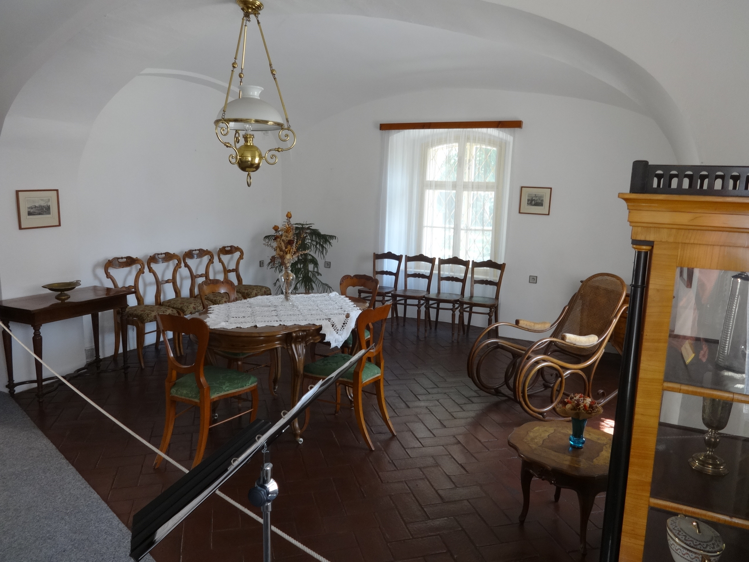 Ehemalige Fleischerei im Geburtshaus Antonín Dvořáks in Nelahozeves (Fotografie mit Erlaubnis der Museumswärterin)